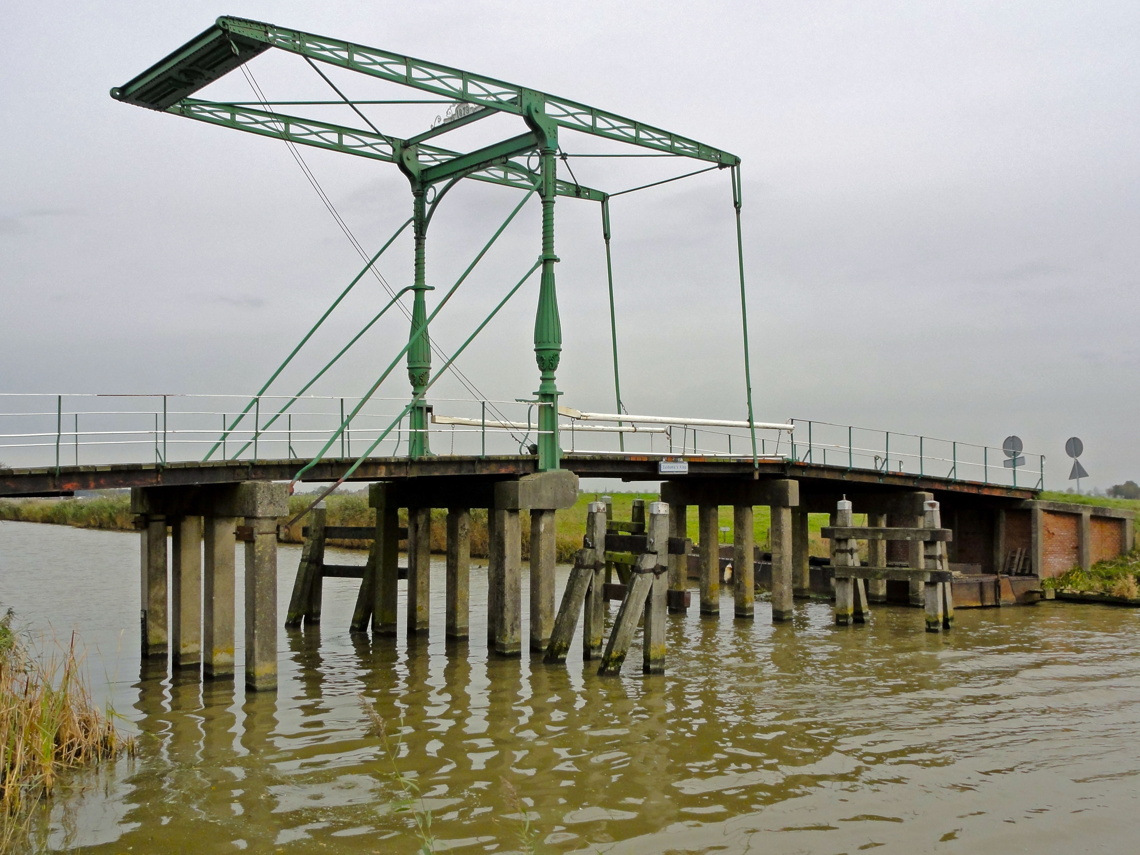 Zuidema's klap brug over het Hunsingokanaal tussen Zoutkamp en Ulrum ter hoogte van Niekerk (de Marne)